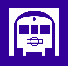 大阪市営地下鉄アイコン